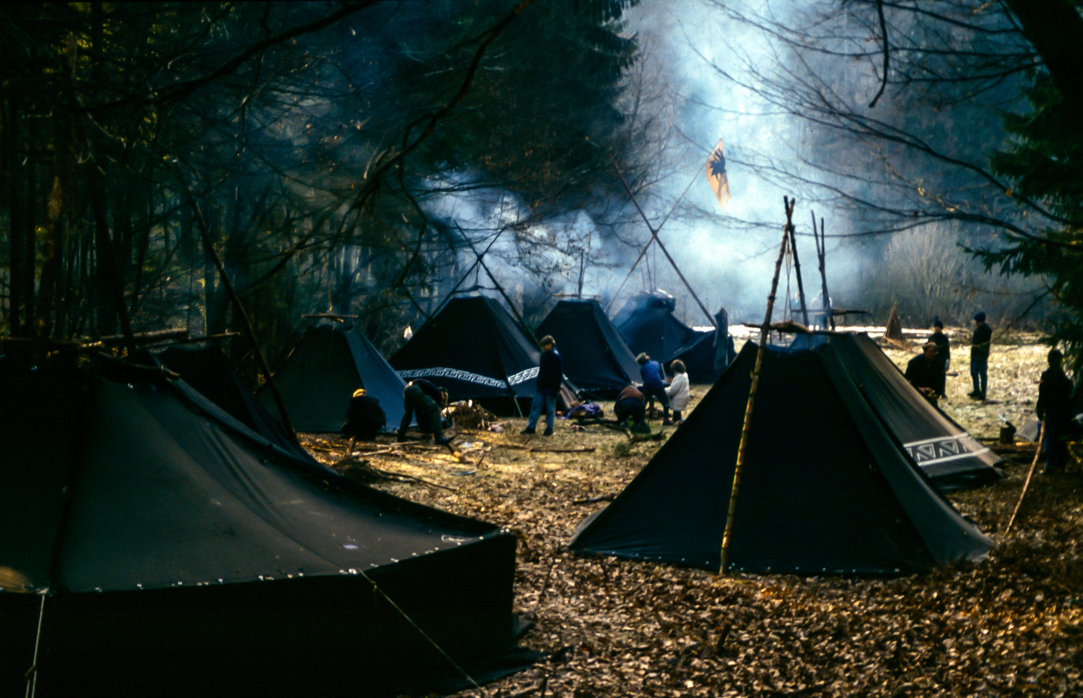 Zugvogel, Deutscher Fahrtenbund: Wintertippel des Wandervogelbundes in Franken